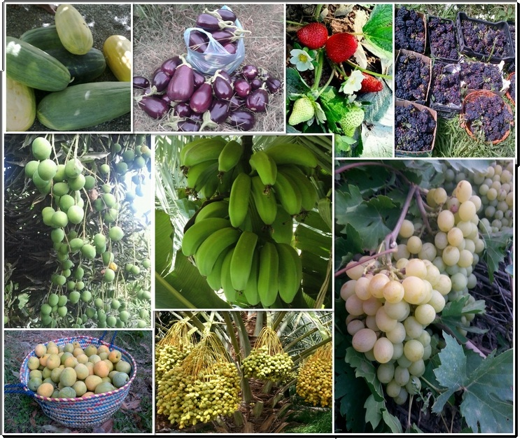 المزروعات الصيفية والشتوية بلدة الوقبة بشمال ولاية ينقل سلطنة عمان